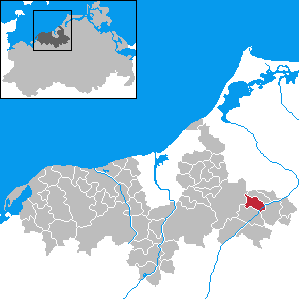 Zarnewanz in Mecklenburg-Western Pomerania - District Bad Doberan